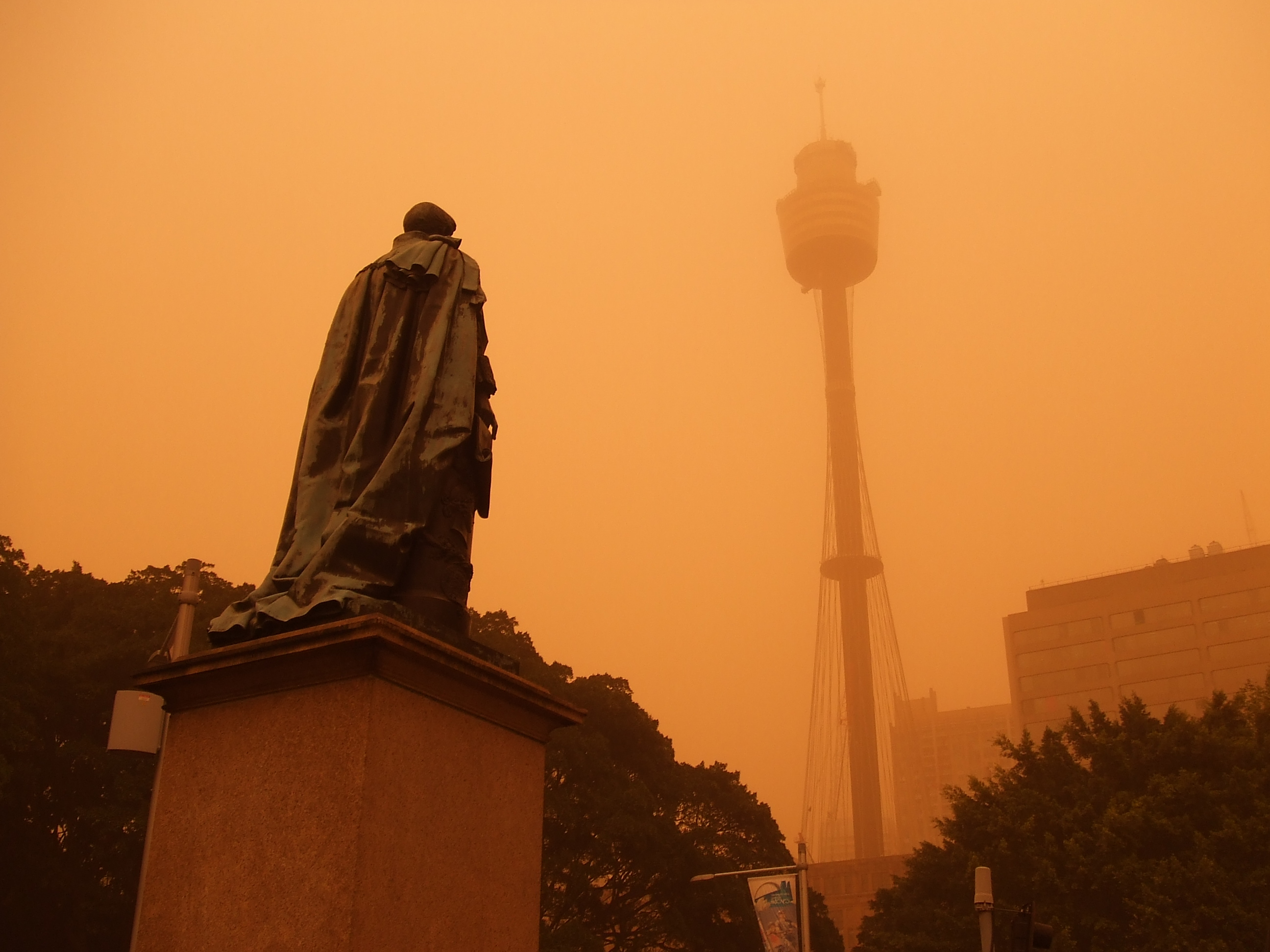 Dust Storm - Sydney